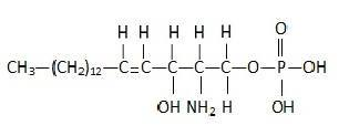 Esfingosina-1-fosfato